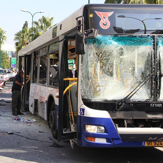 הפיגוע באוטובוס בתל אביב ביום האחרון למבצע עמוד ענן